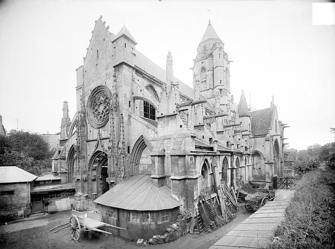 église Saint-Étienne-le-Vieux à Caen.